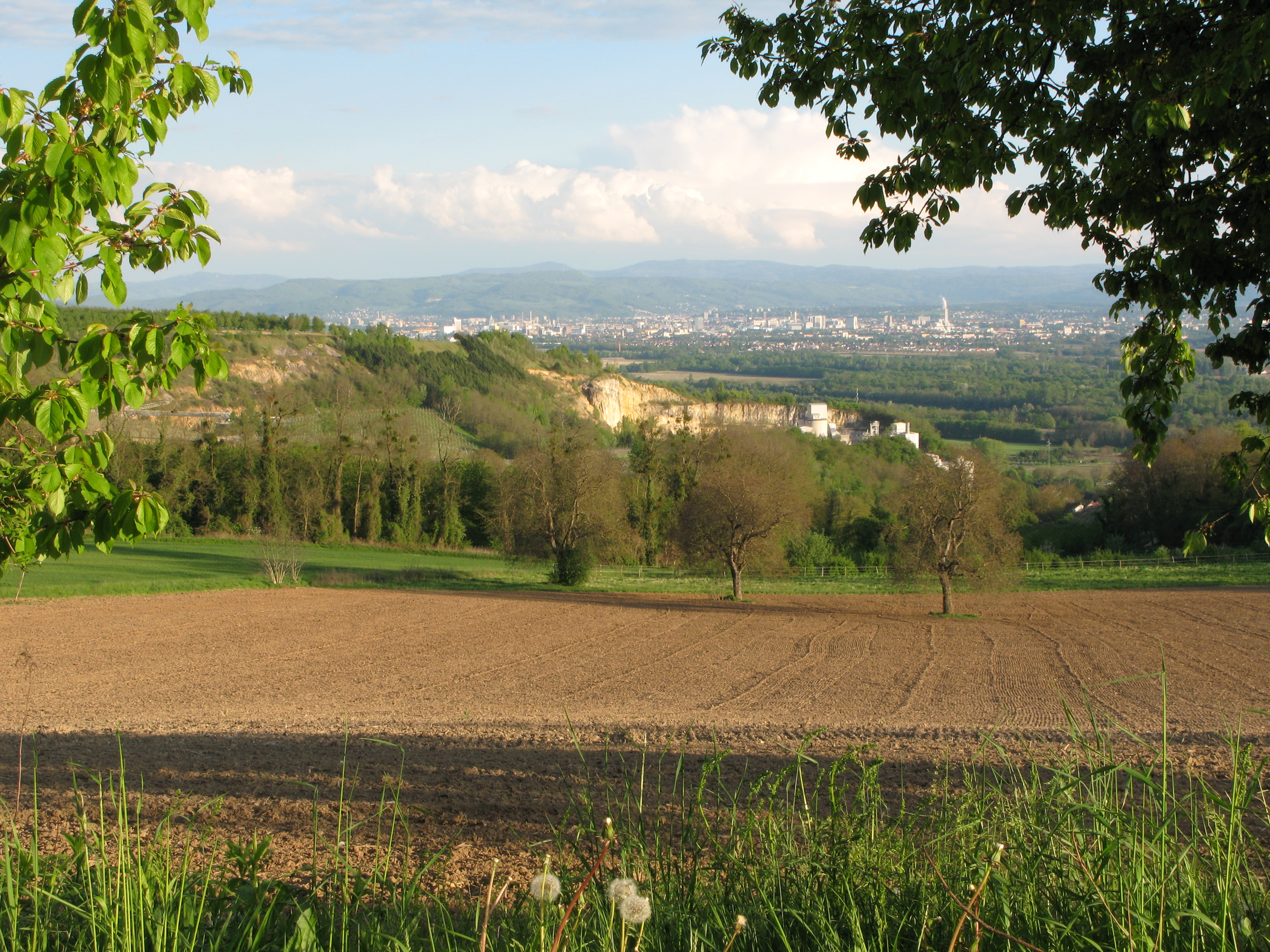 Sicht auf Basel bei Huttingen und dem Isteiner Klotz am Fernwanderweg Markgräfler Wiiwegli im Markgräflerland.